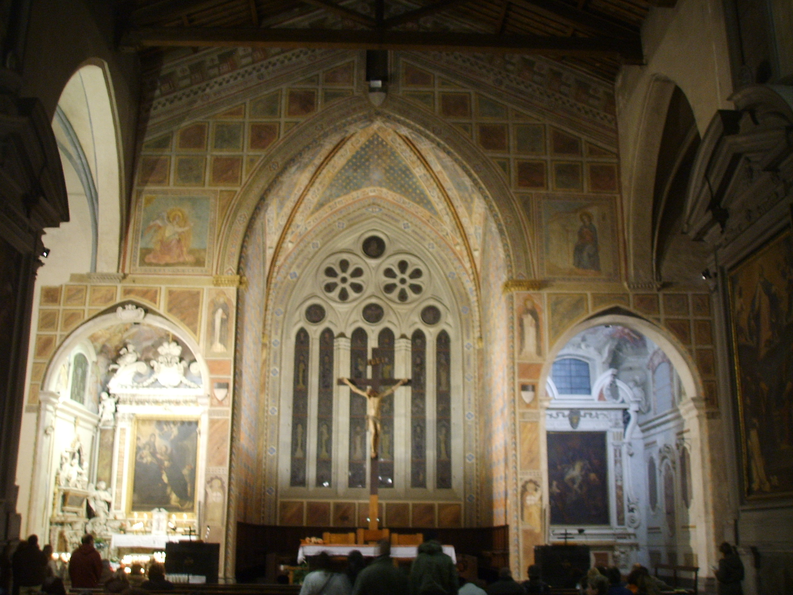 Pistoia, san domenico interno